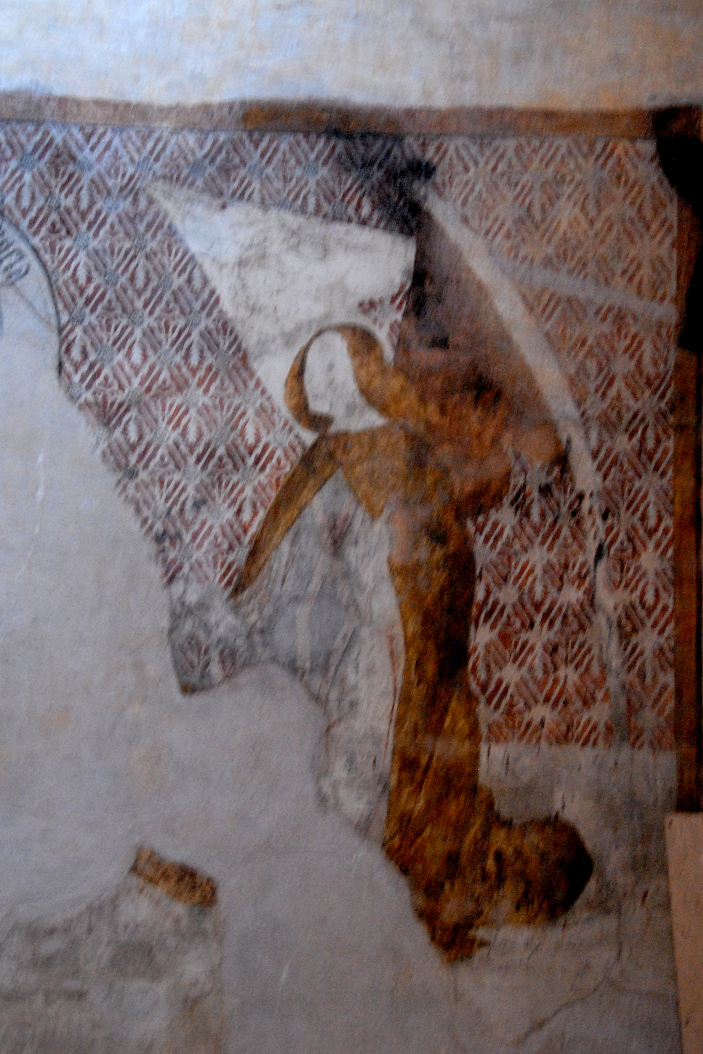 Kirche St.-André Lavaudieu, Fresko, Südwand, in Blendarkade von Joch 1